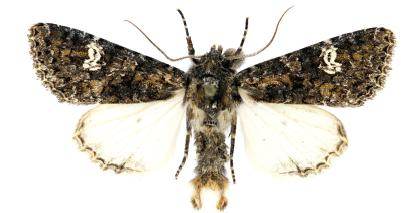 Polymixis serpentina minoica